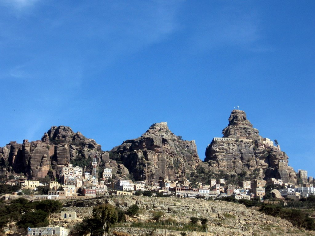 Al Hajjara